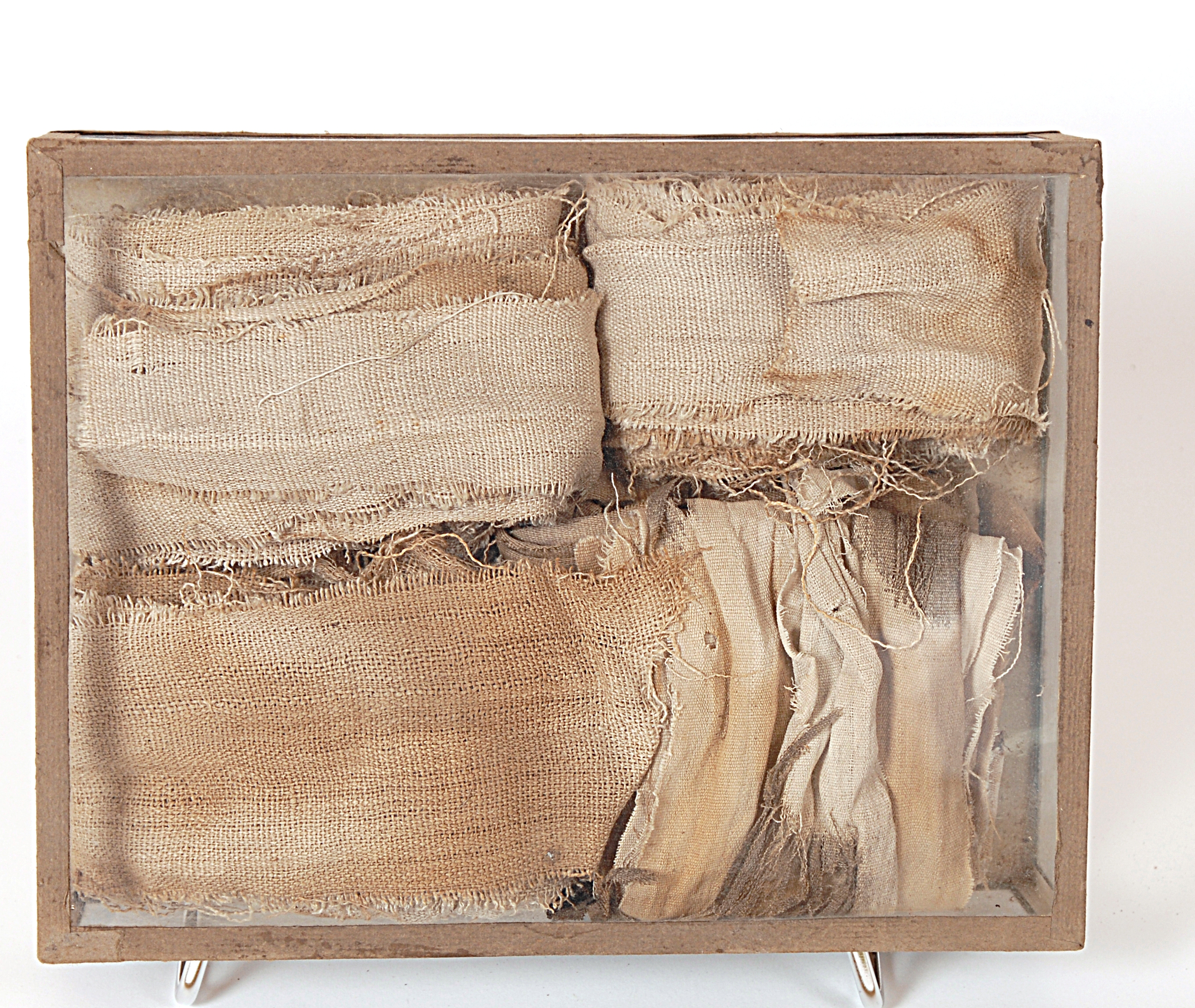 Grupo de vendas que se usaban para cubrir momias egípcias, formado por cinco paquetes de tiras de lino, de diferentes entramados.